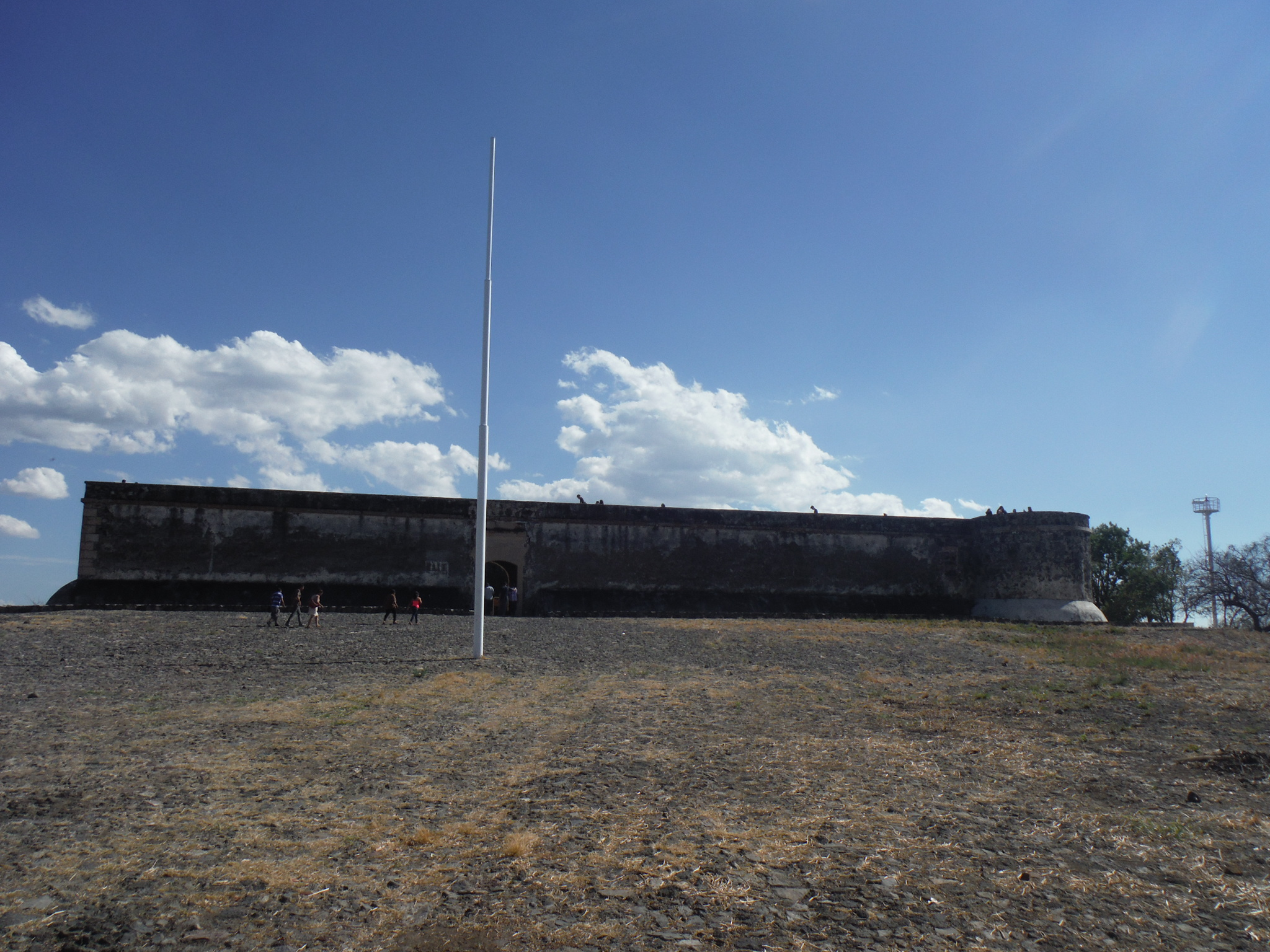 El fuerte o presidio ubicado en la Isla de Mezcala.